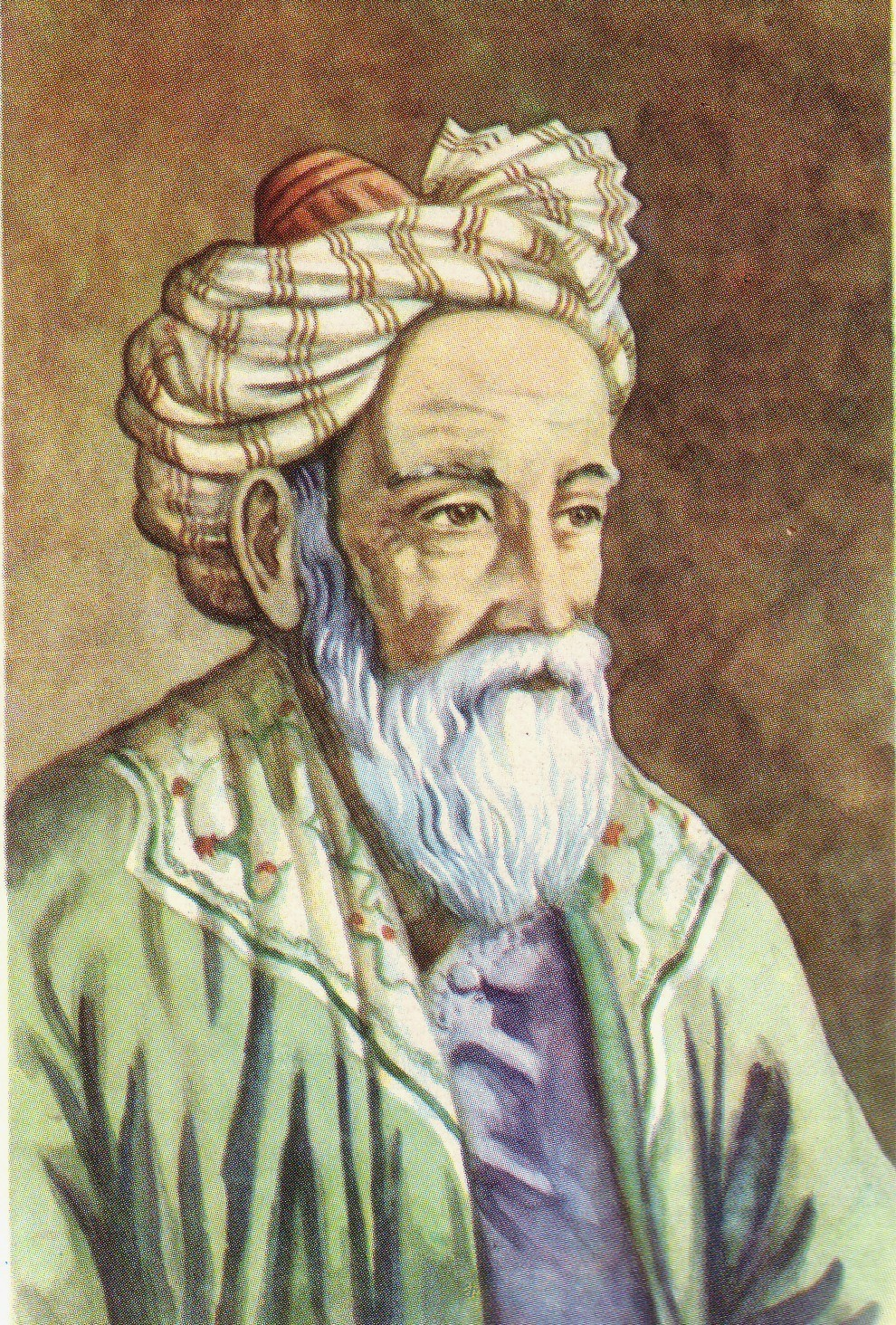 Omar Khayyam Photo scannée par Utilisateur:Atilin depuis la source soviétique sans droits d'auteur. auteur du dessin : A. Venediktov